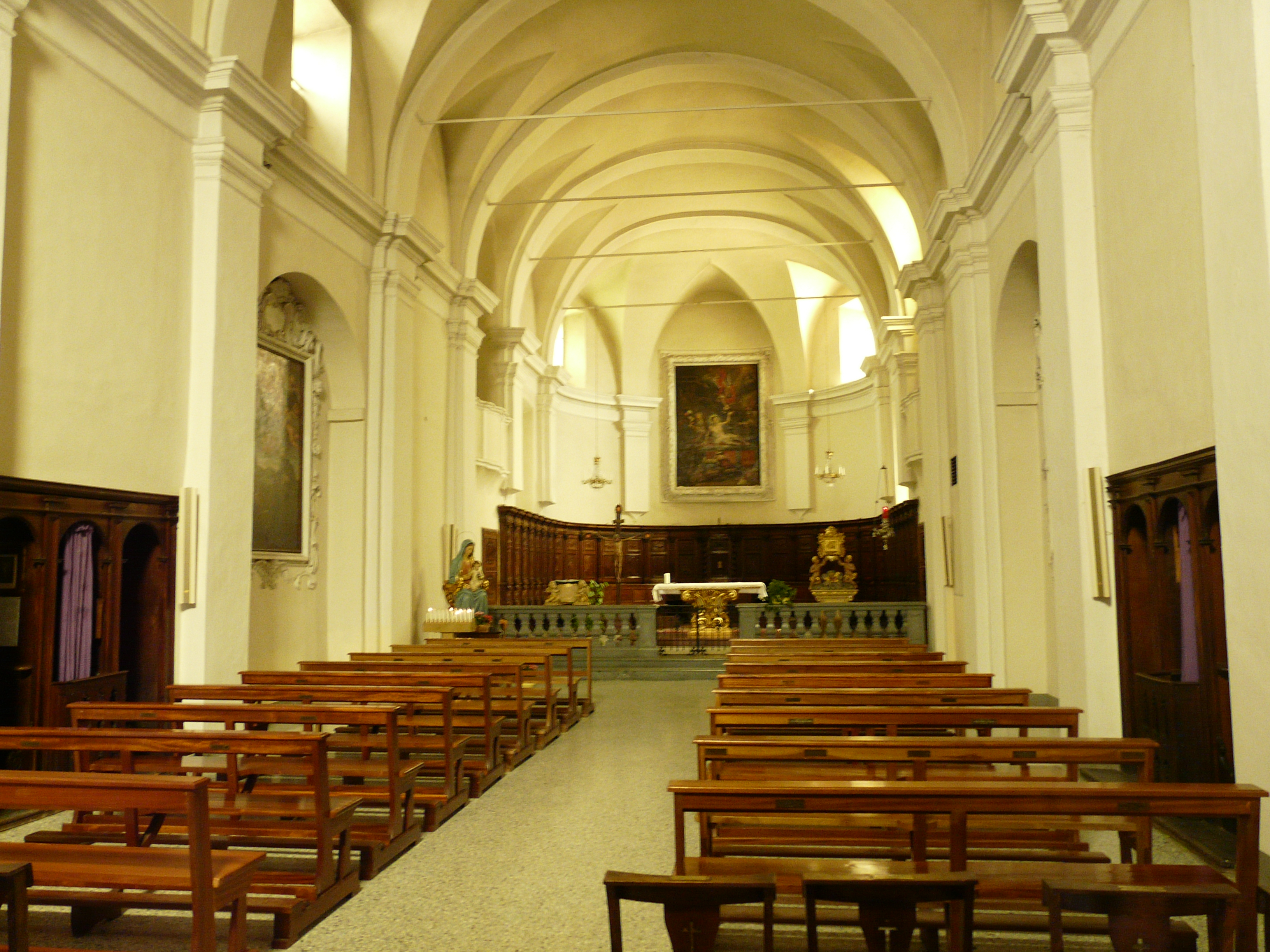 Immagini della chiesa di San Lorenzo di Bobbio, Emilia-Romagna, Italia